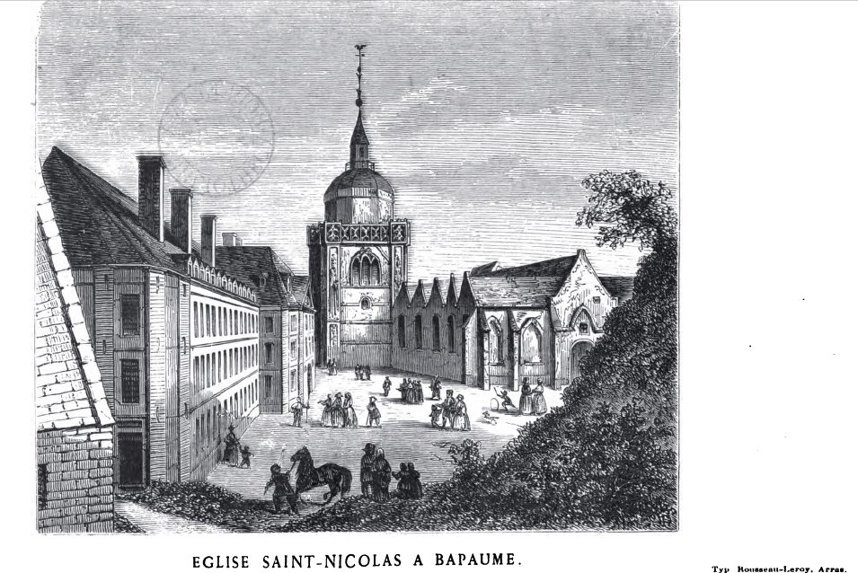 Eglise St Nicolas de Bapaume au 19ème siècle